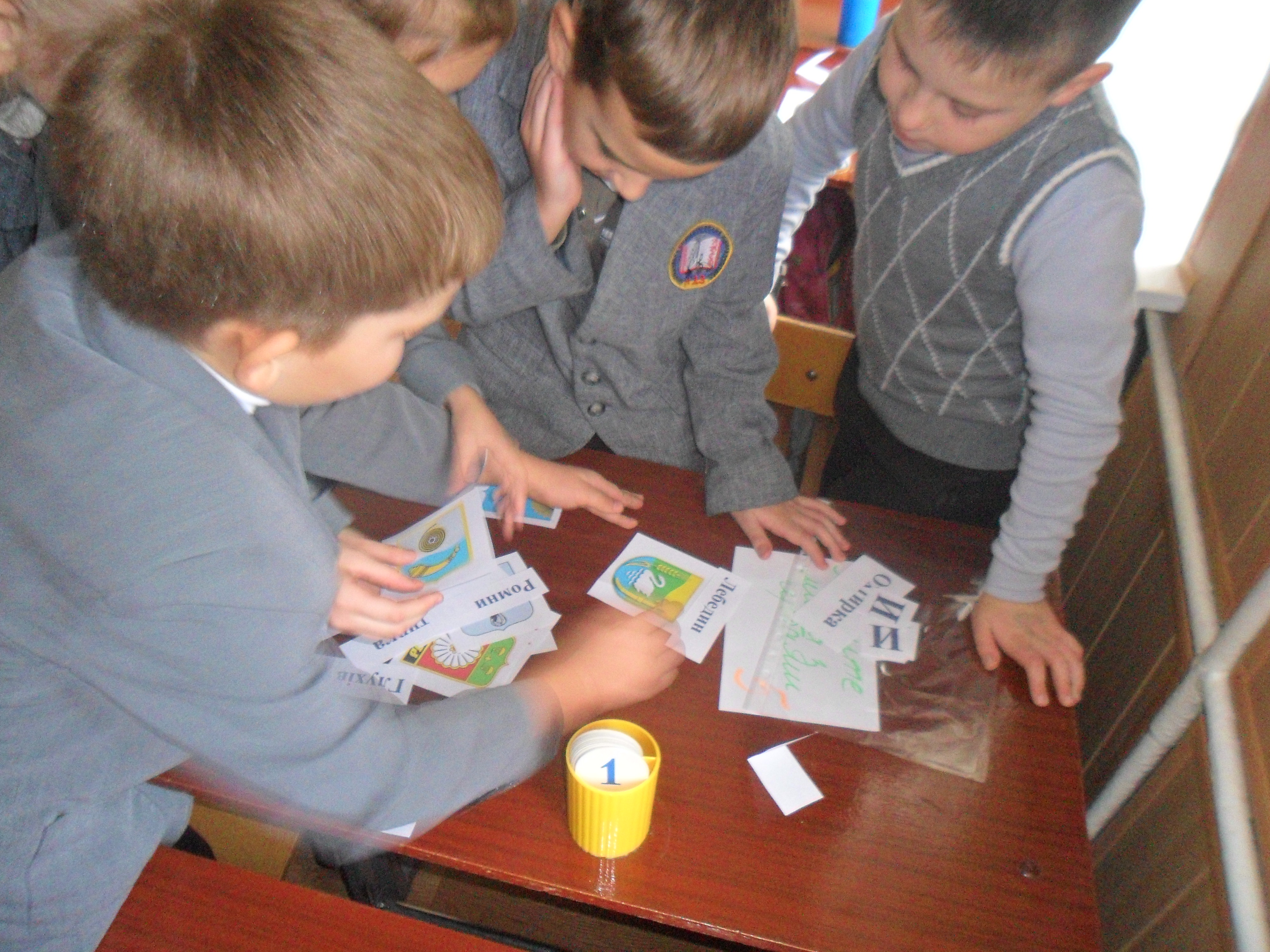 Робота учнів у групі на уроці природознавства